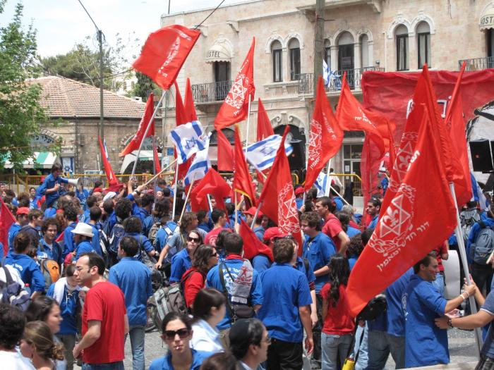 עצרת בכיכר ציון